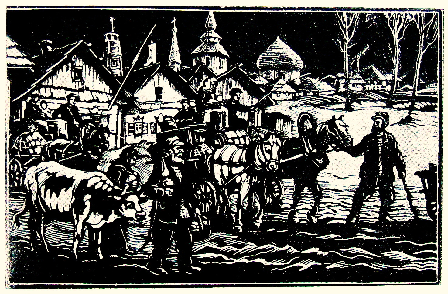 Саламон Юдовін. У калгас. Дрэварыт